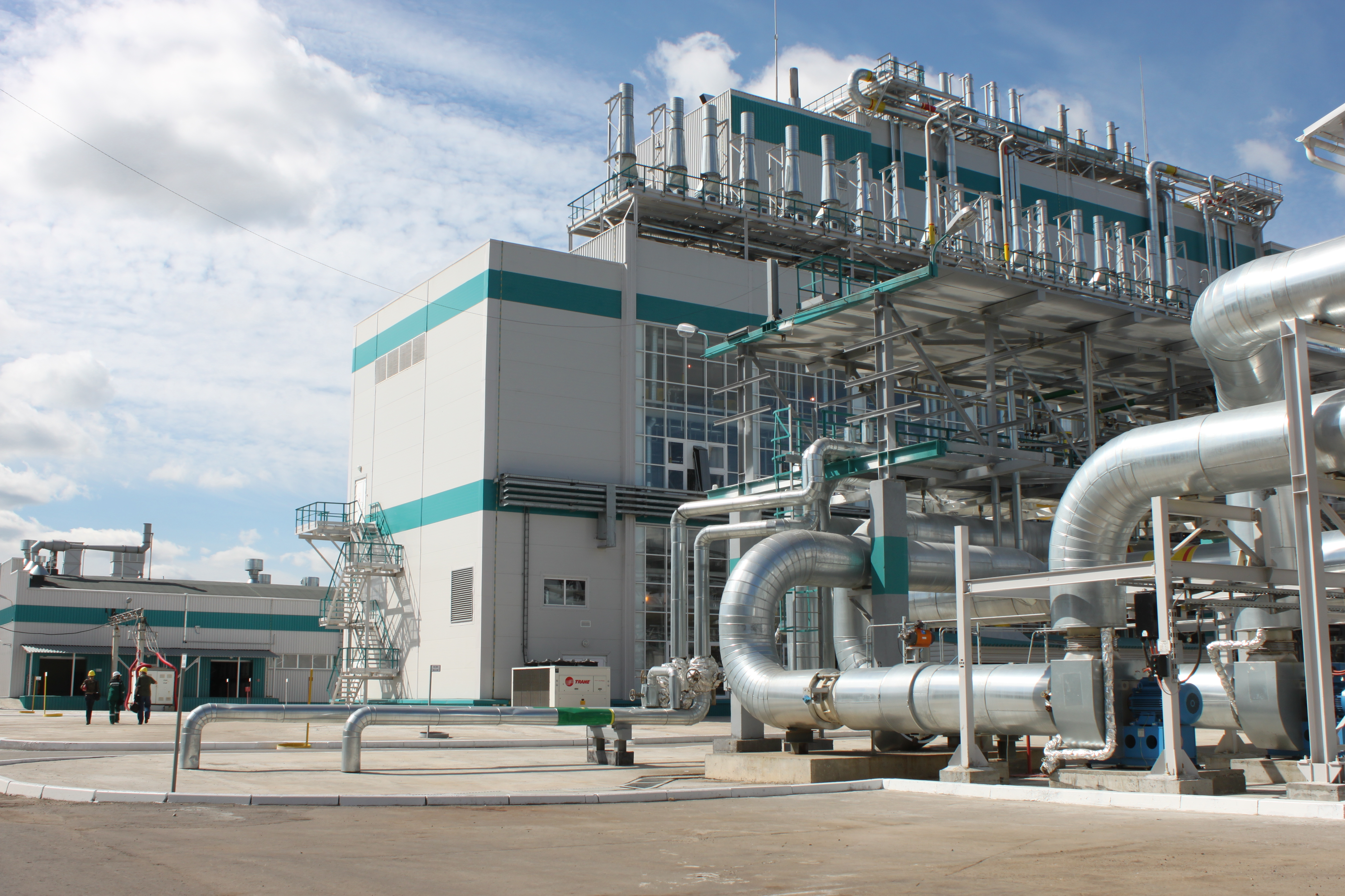 полистирол